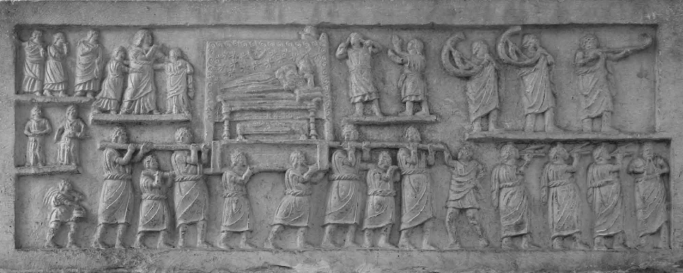 Reliëf van romeinse begrafenis processie uit Amiternum, Italië.